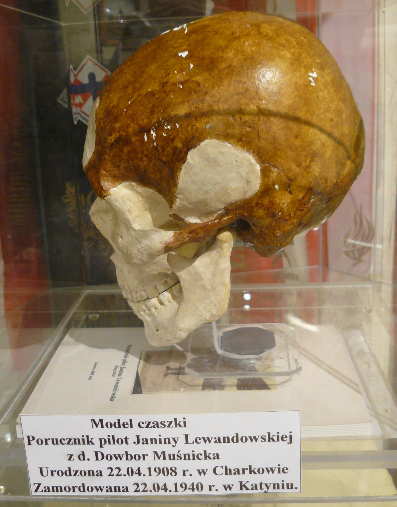 Eksponat Muzeum Powstańców Wielkopolskich w Lusowie.